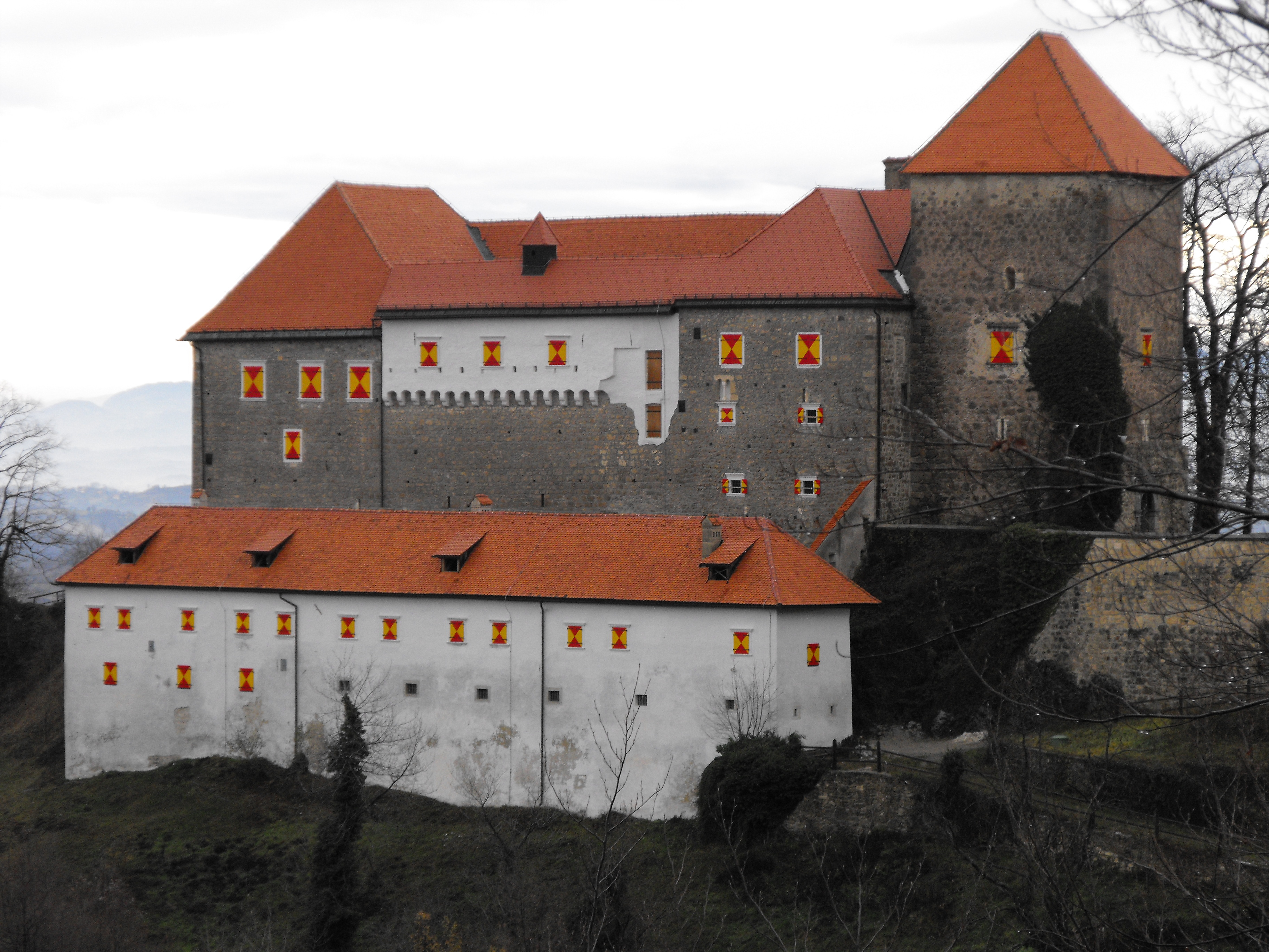 Grad Podsreda